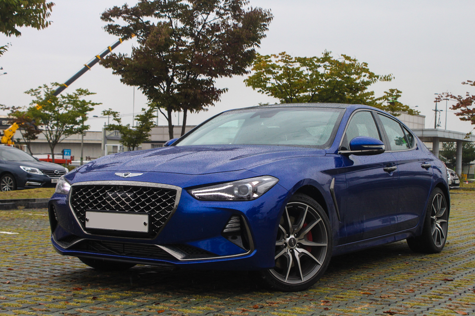 제네시스 G70 정측면